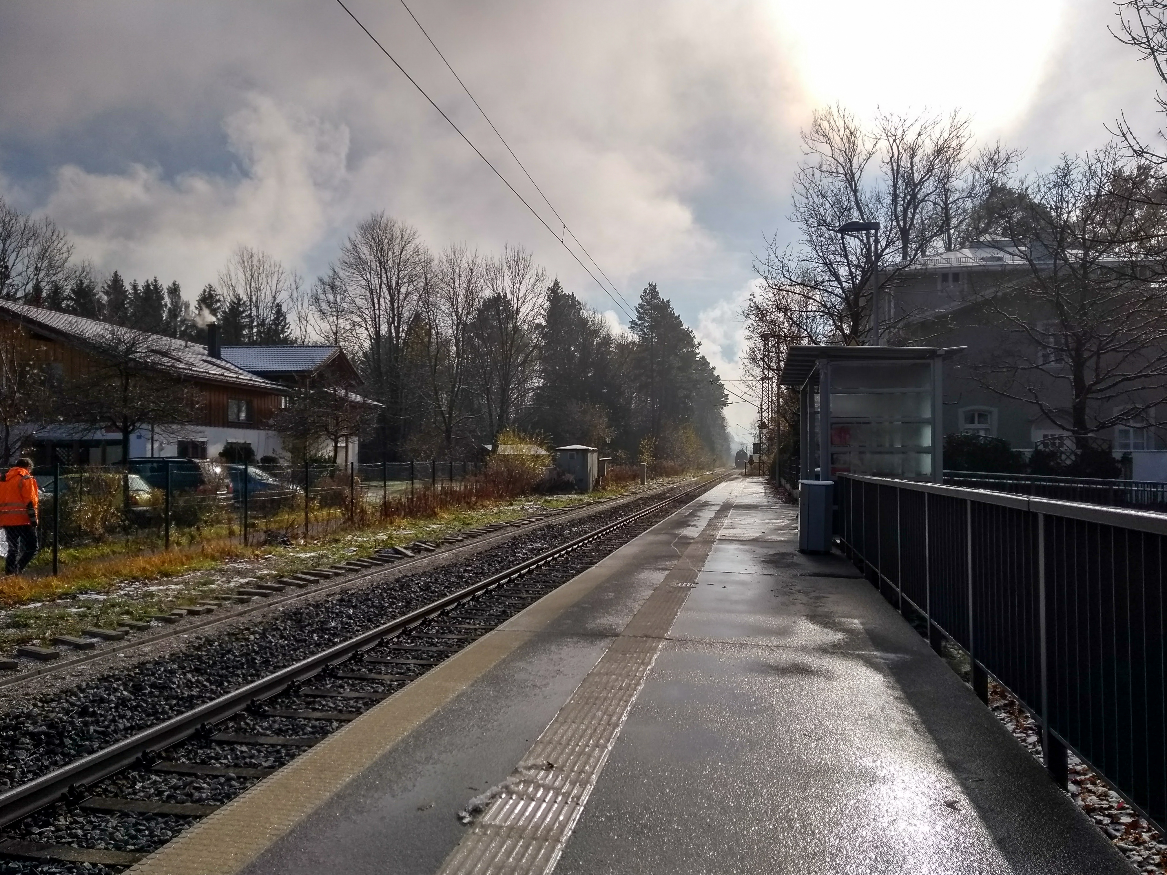 Bahnhof Iffeldorf, Blick nach Süden.